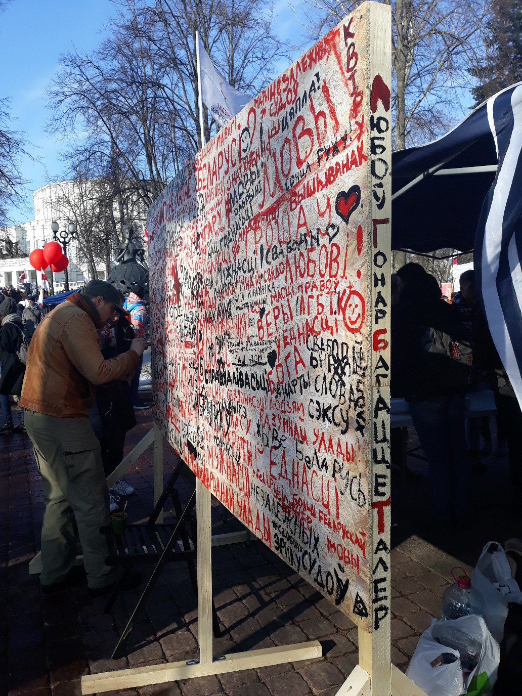 Дошка для пажаданняў